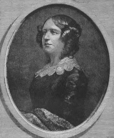 Natalia Kicka